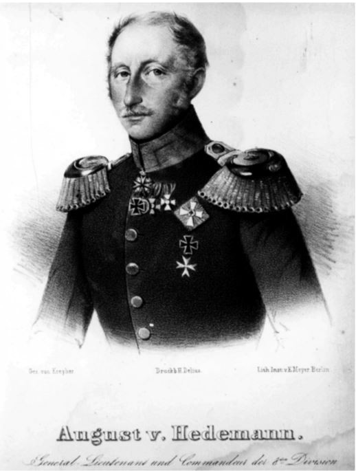 Porträt des preuß. Generals August von Hedemann